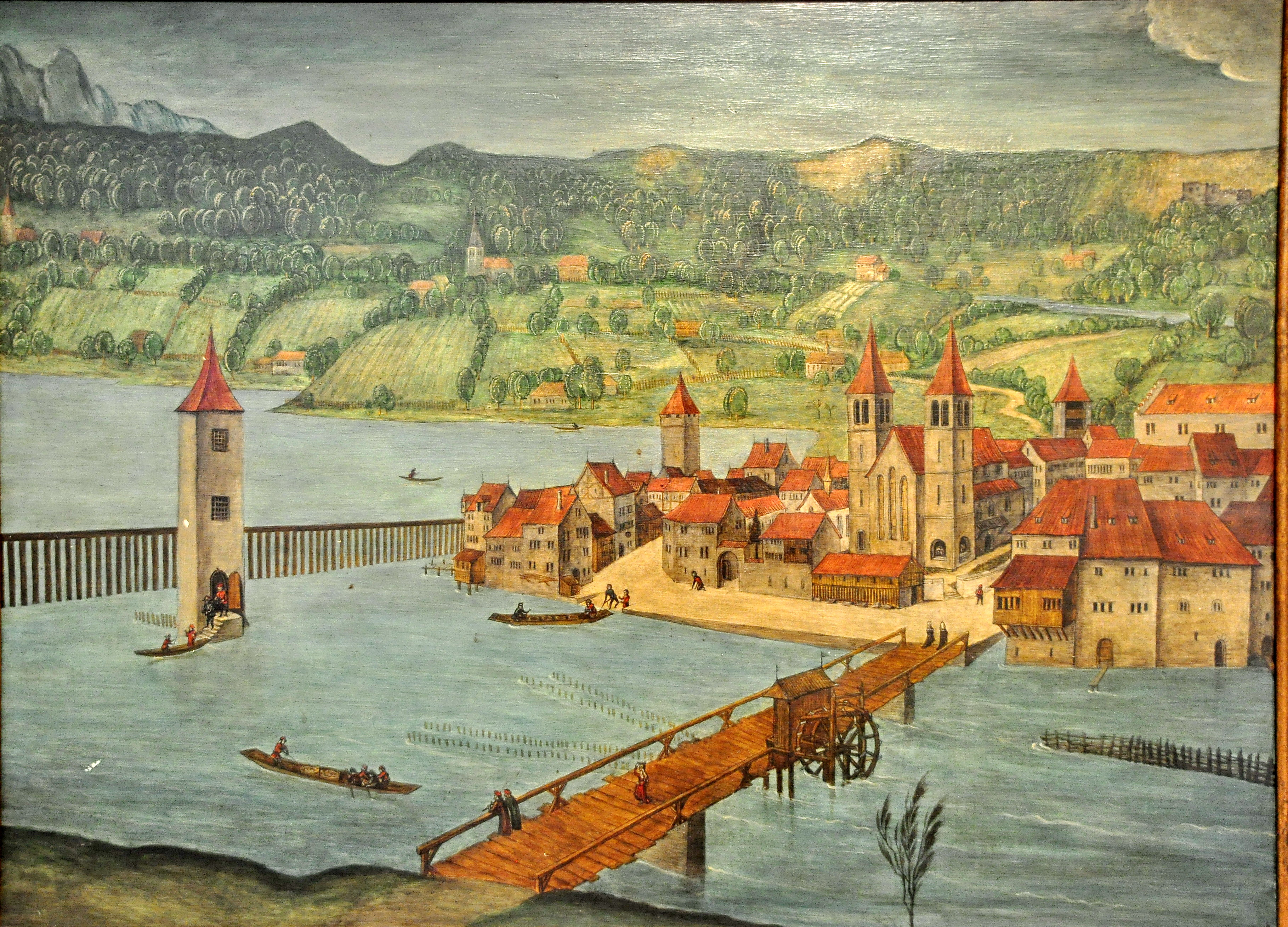 Replik der Altartafeln von Hans Leu im Baugeschichtlichen Archiv der Stadt Zürich im Haus zum Rech. Die Panoramansicht des linksseitigen Limmatufers – 'Standort' der BetrachterIn ist wohl der Karlsturm des Grossmünsters – von Hans Leu d. Ä. gilt als die älteste zuverlässige Darstellung der Stadt Zürich, Ende des 15. Jahrhunderts auf den Altartafeln im Grossmünster mit viel Liebe zum Detail festgehalten. Die originalen Tafeln sind heute im Landesmuseum ausgestellt, eine (vermutlich) 1:1 Replik ist im Stadtarchiv öffentlich zugänglich.